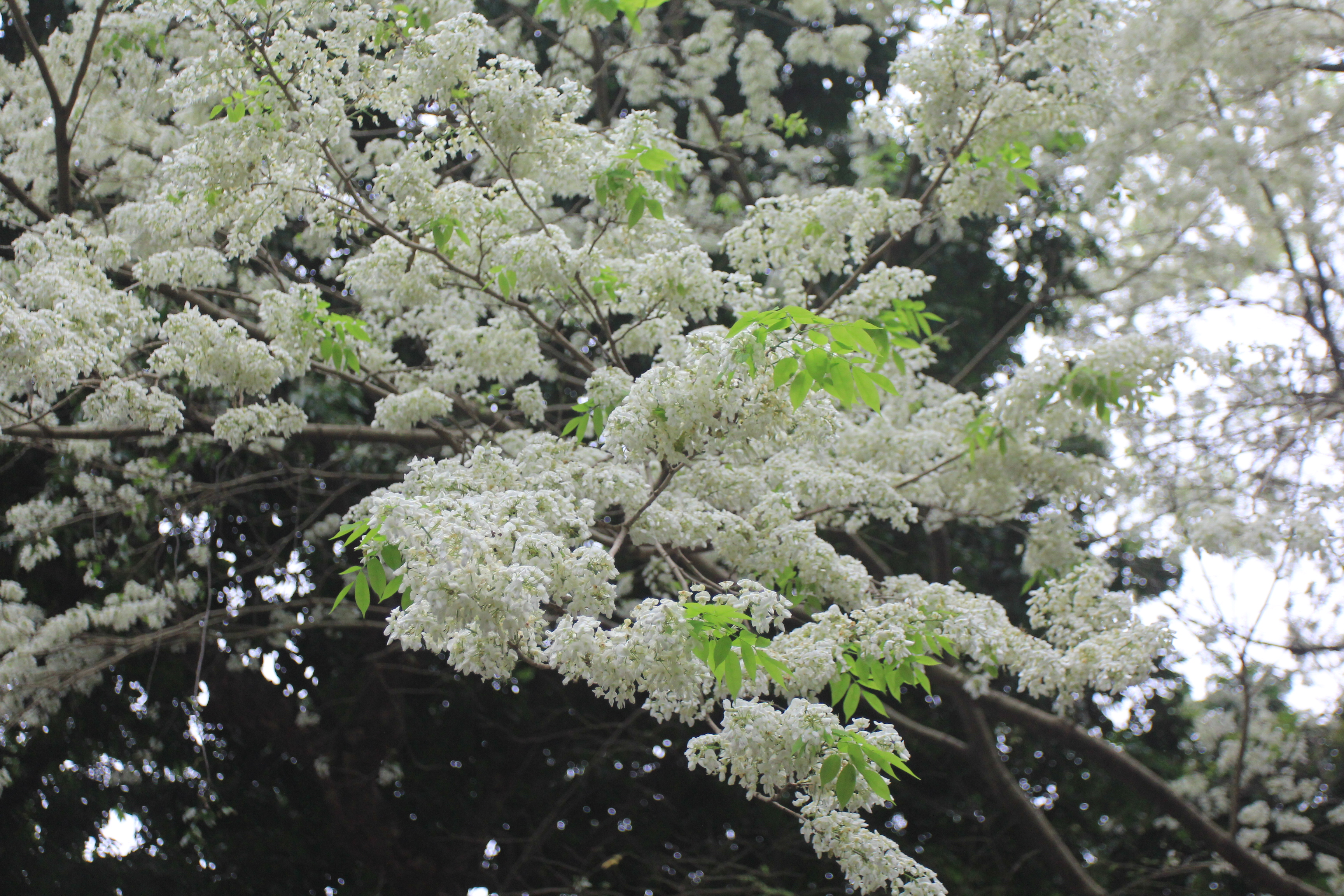 Loài hoa tháng ba